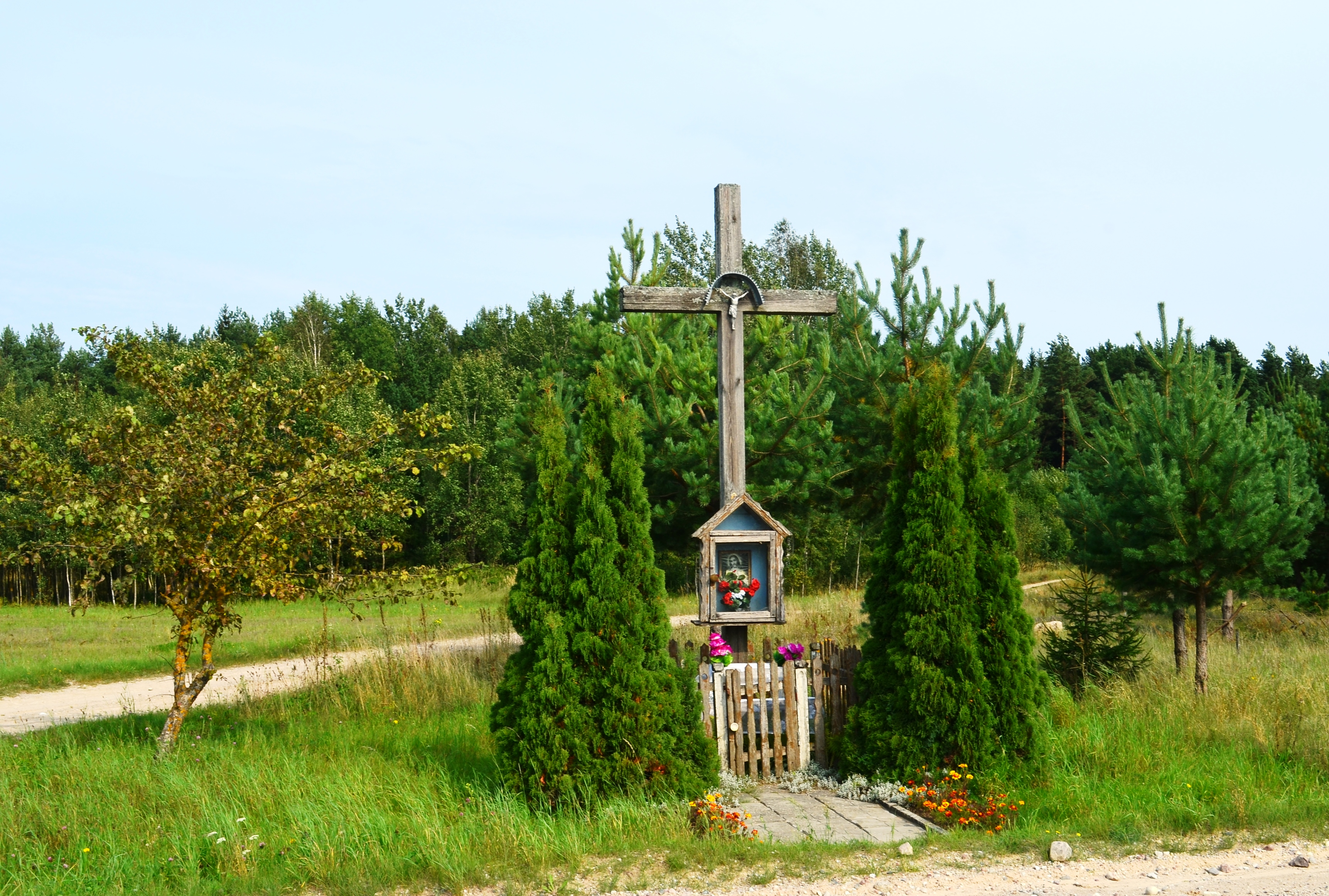 Dėdoniškių kryžius, Mickūnų sen., Vilniaus raj.